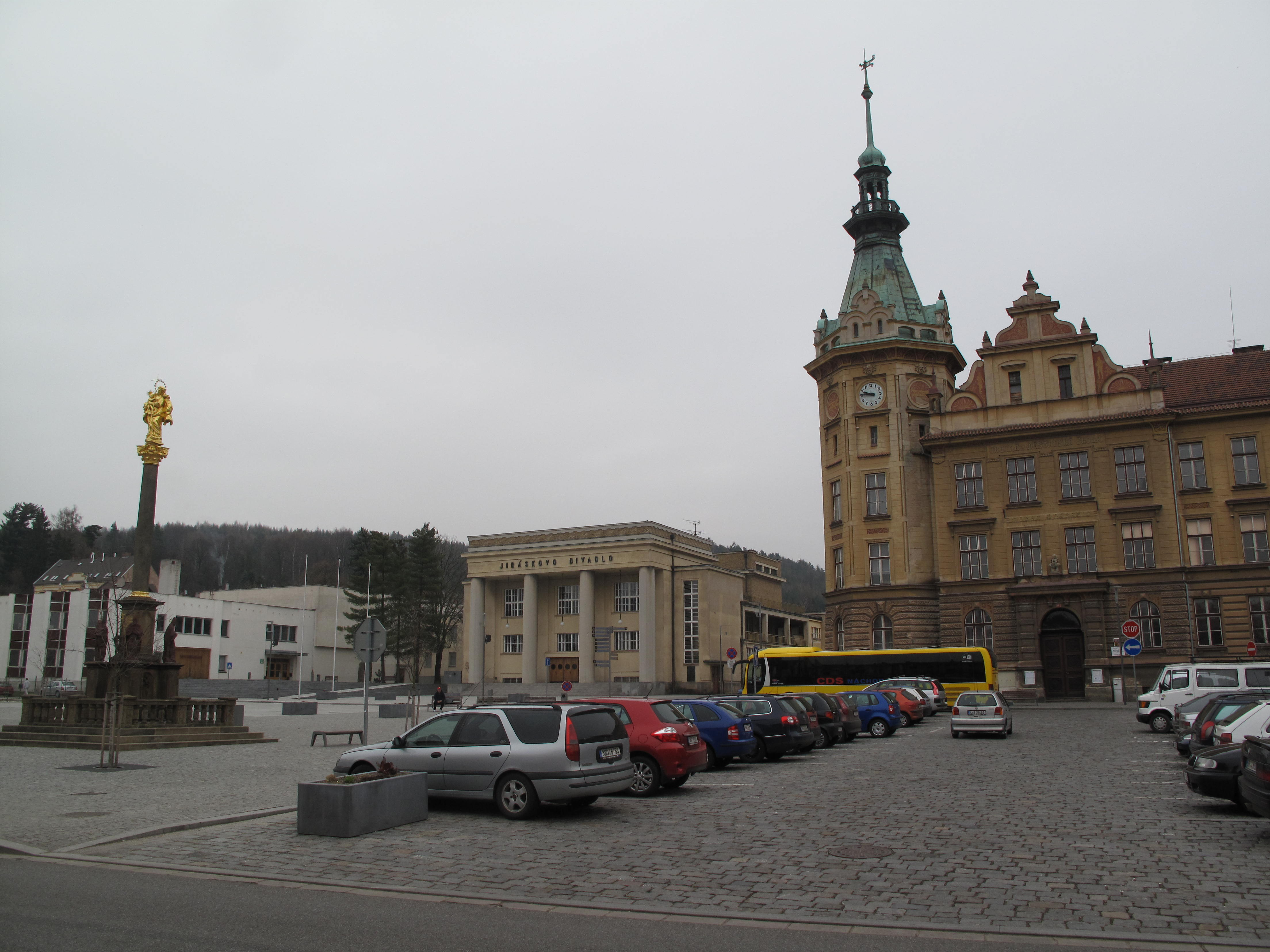 Hronov, Jiráskovo divadlo